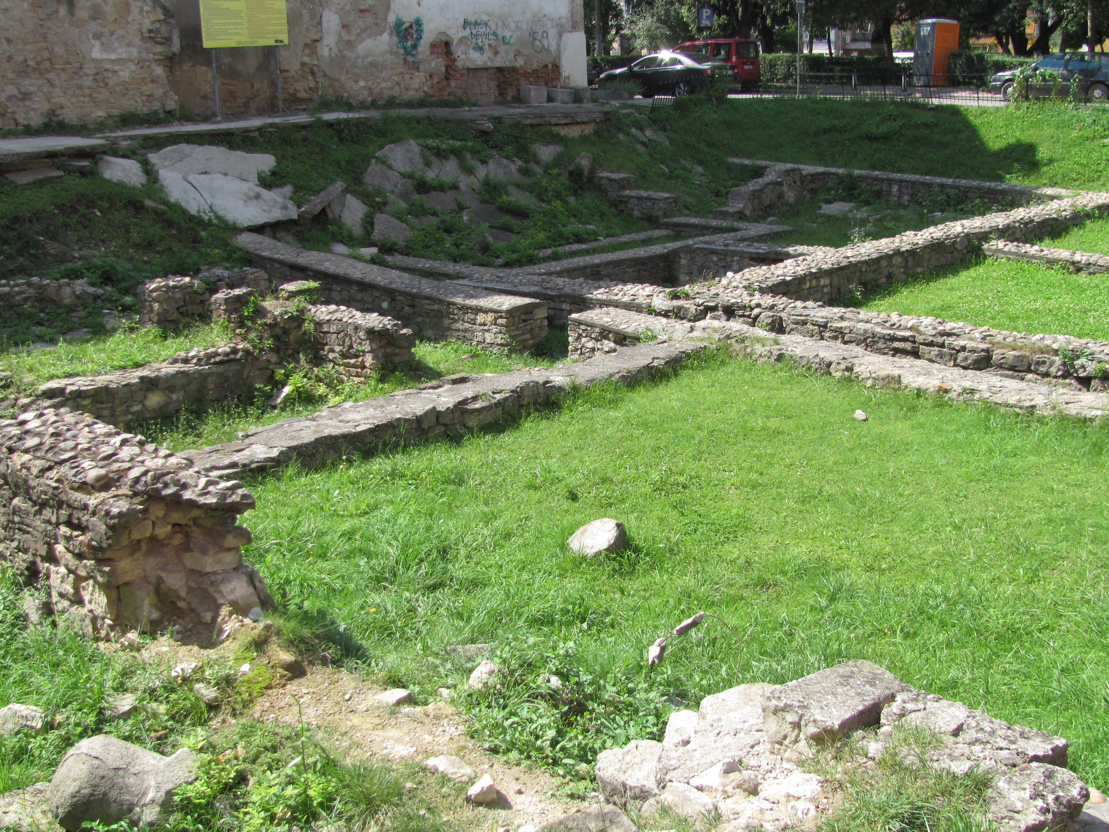 Cluj-Napoca - Parcul arheologic de pe Str. Deleu